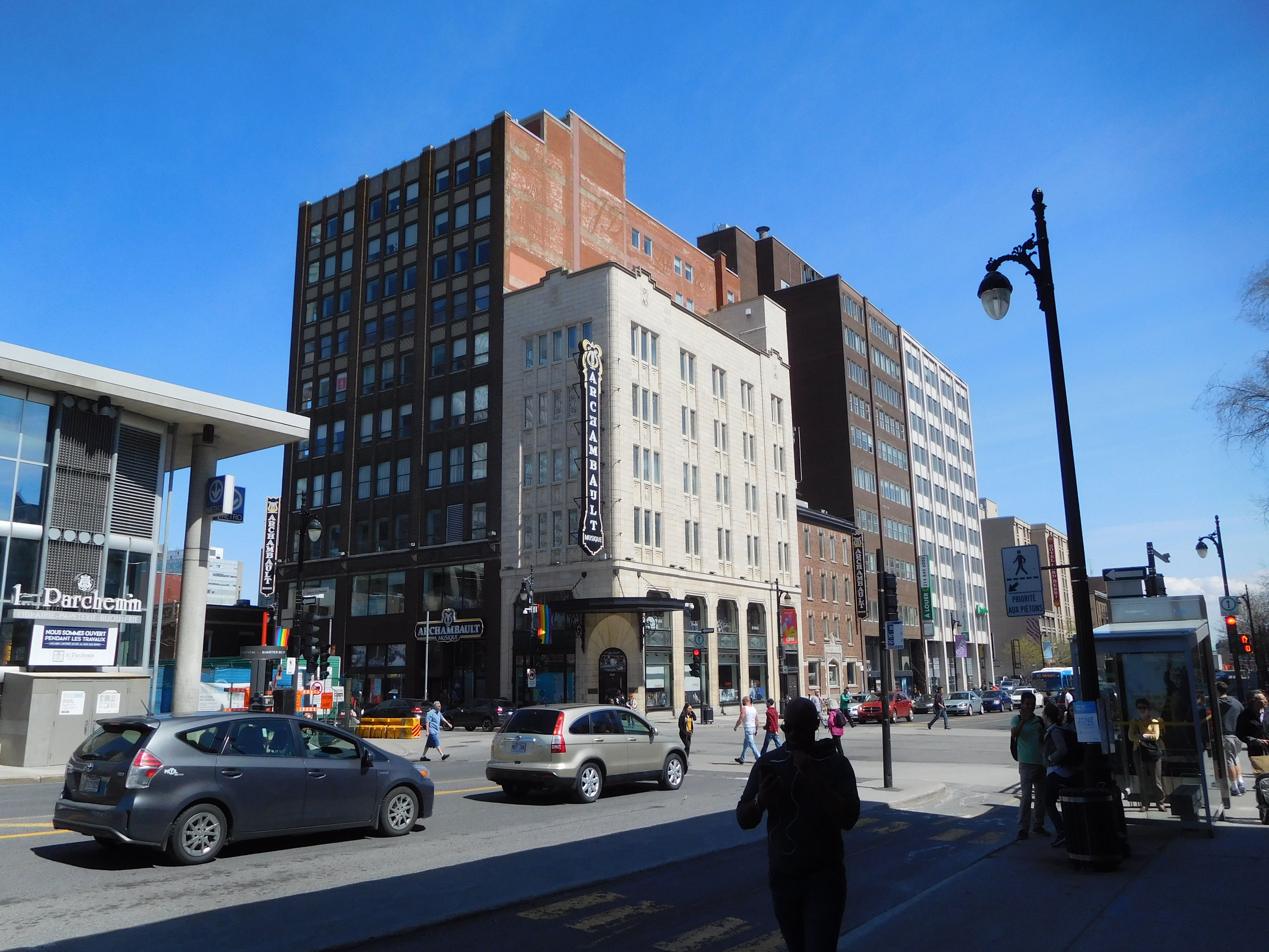 Angle sud-est des rues Berri et Sainte-Catherine Magasin Archambault Musique, 500, rue Sainte-Catherine Est, Montréal, Québec, H2L 2C6